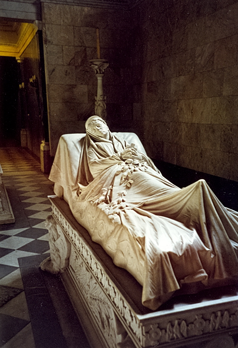 Grabmal der Kaiserin Augusta